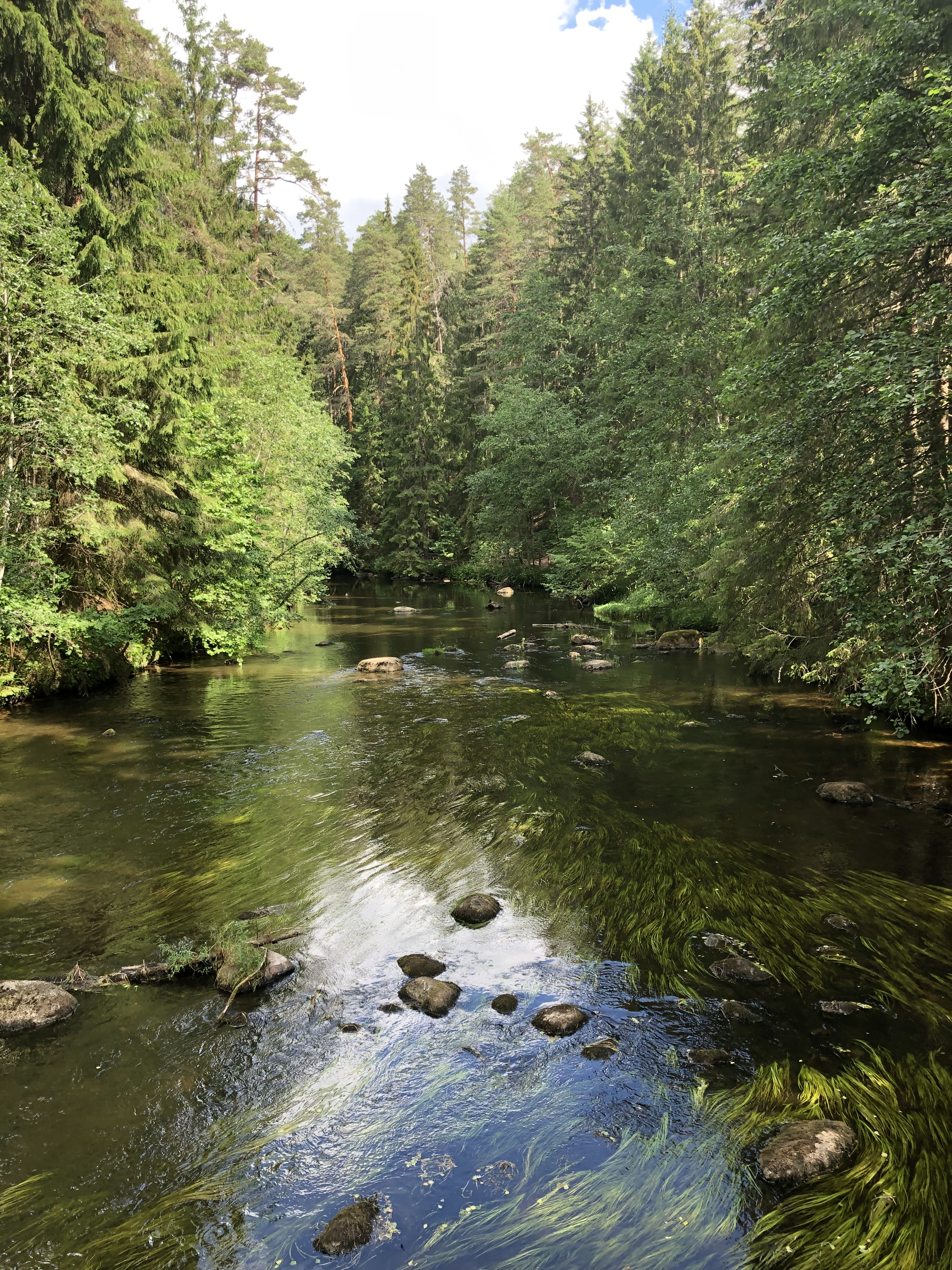 Ahja jõgi